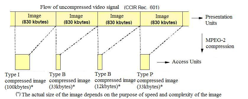 tramas mpeg